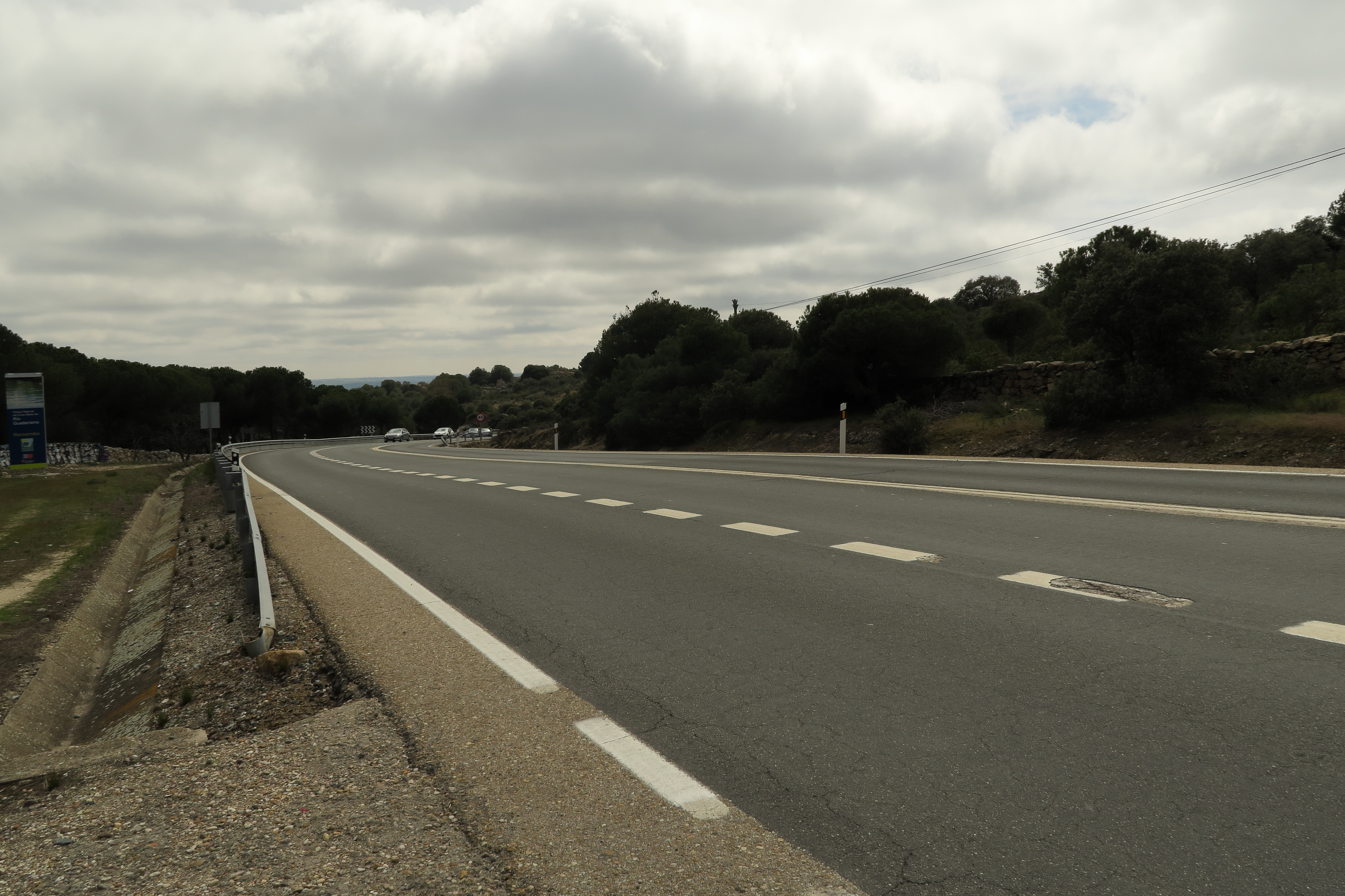 Puerto de Galapagar